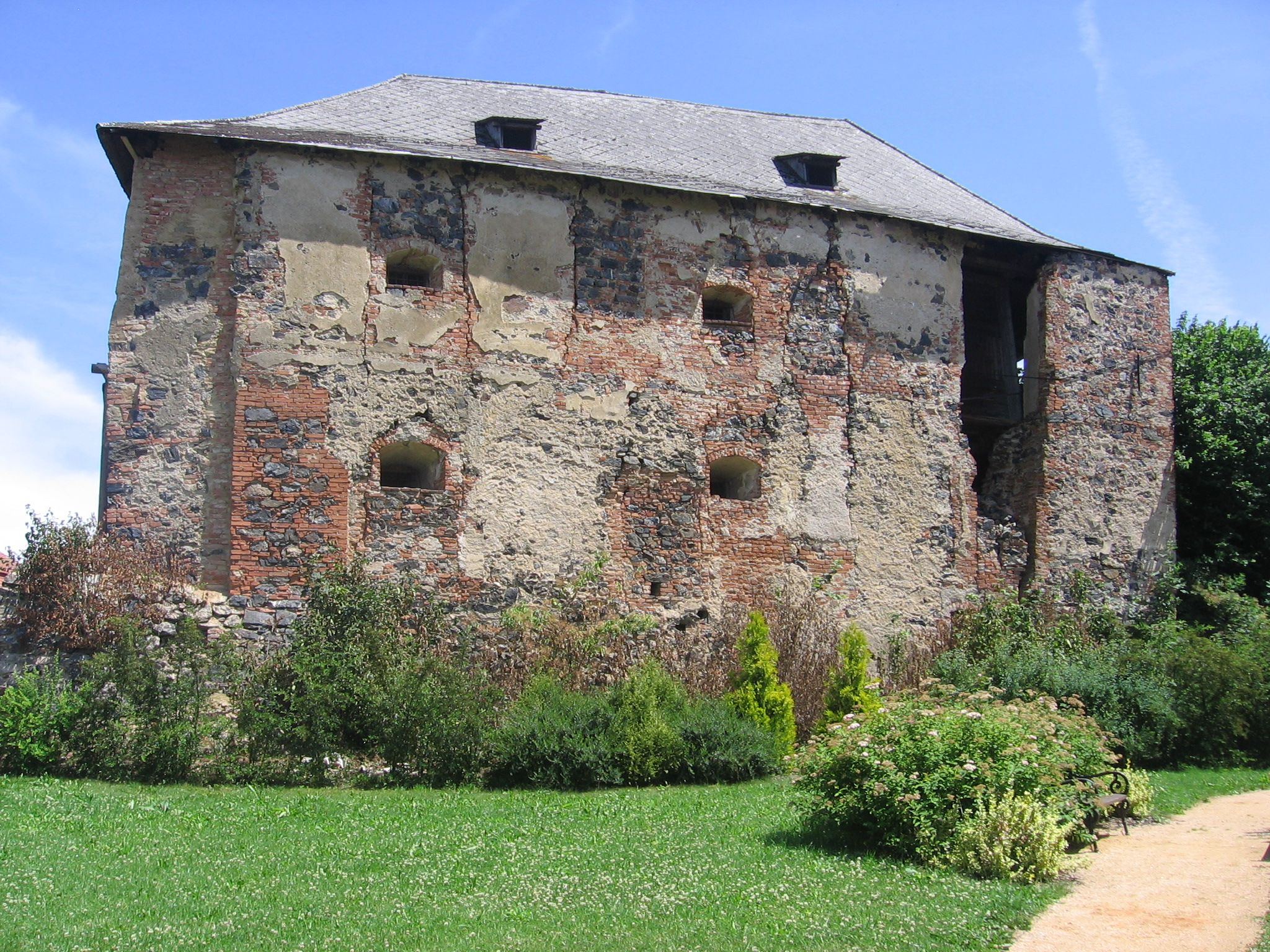 Tvrz, v areálu hosp. dvora čp. 4, Řenče.